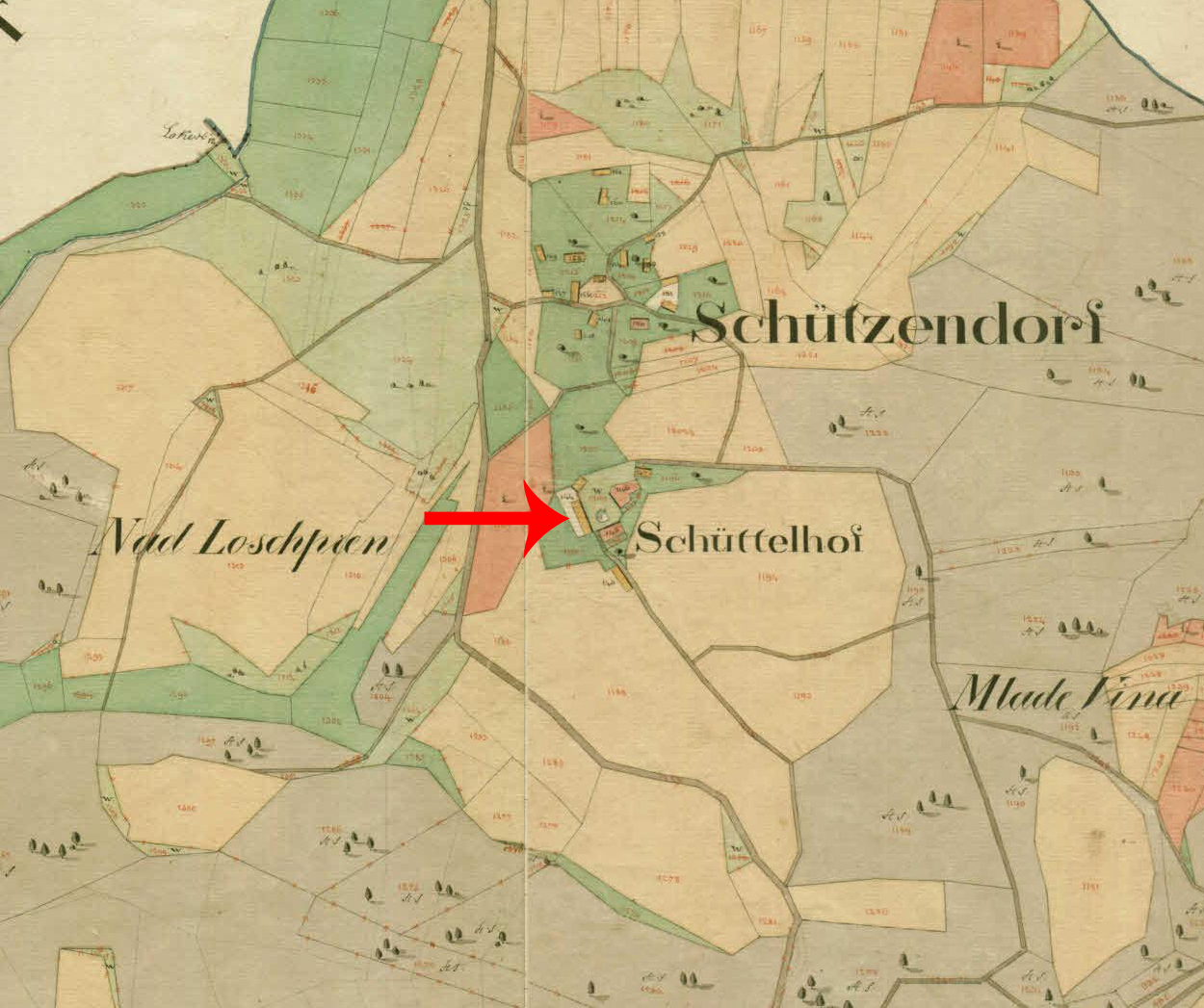 Franciscejski kataster za Kranjsko, 1823-1869